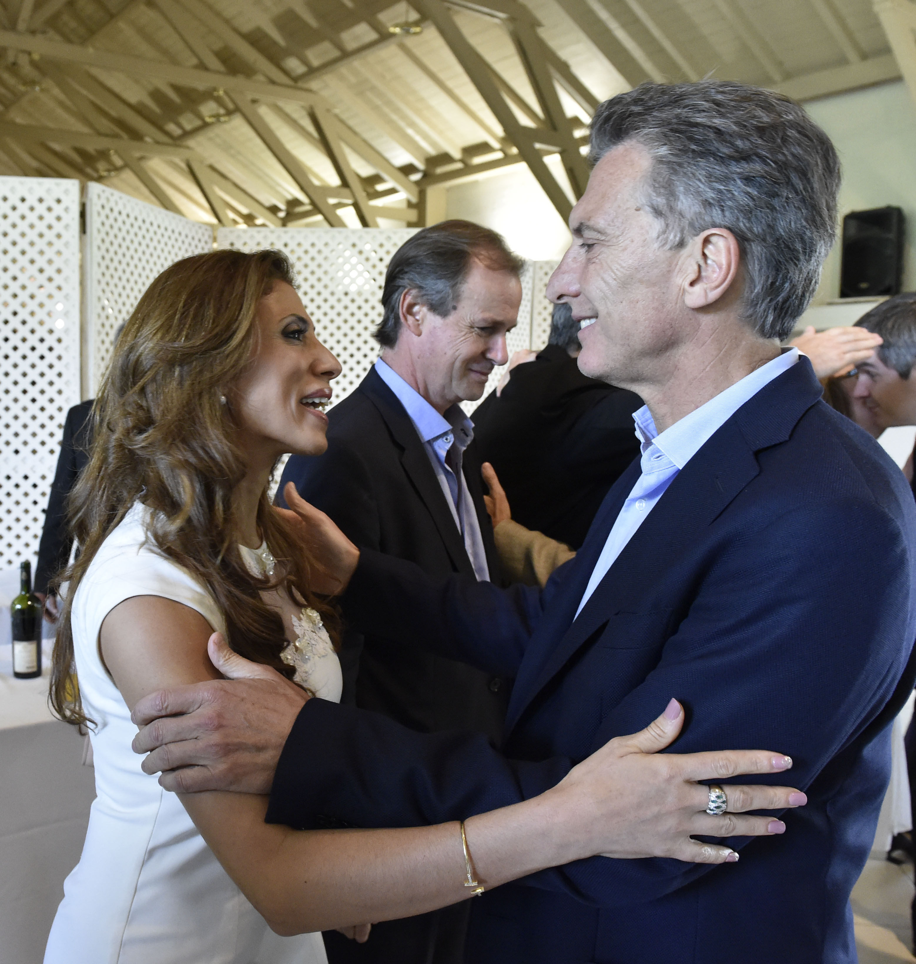 Mauricio Macri saludando a Claudia Ledesma Abdala de Zamora